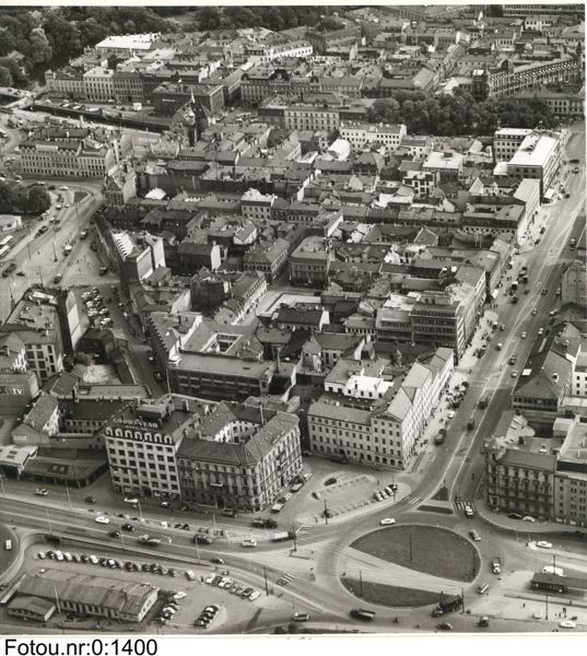 Östra Nordstaden, Göteborg, flygfoto 1962. Bildsamlingen vid Göteborgs stadsmuseum.